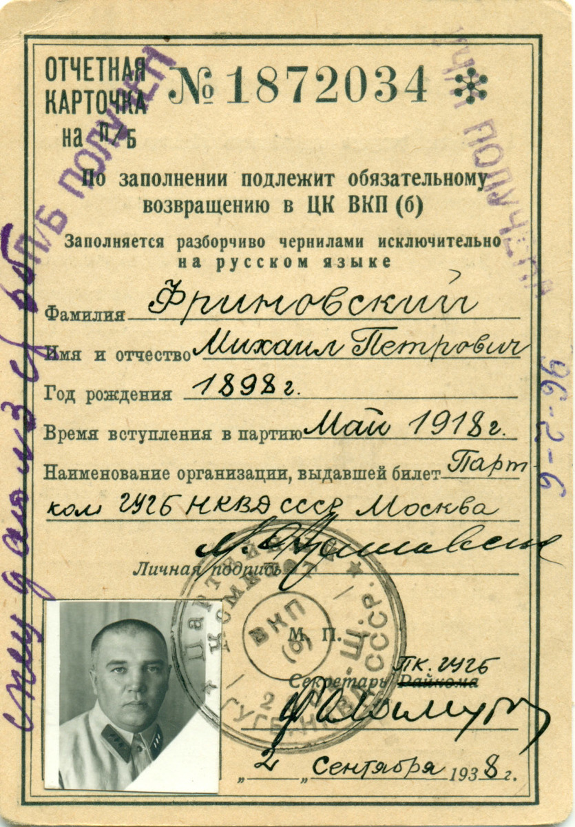 Партийная карточка Михаила Фриновского, сотрудника НКВД, организатора "Большого террора".